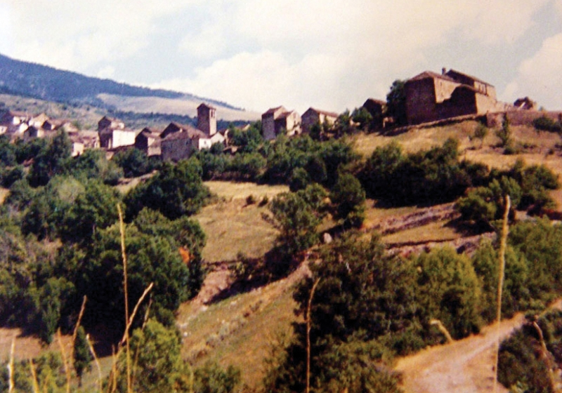 Fotografía de Cenarbe antes de su expropiación que se encuentra en el Ayuntamiento de Villanúa